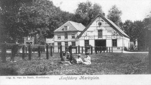 Het Marktplein in Hoofddorp een eeuw geleden (rond 1910). Rechts een stalling voor paarden voor de paardenmarkt die op het Marktplein gehouden werd. De straat achter het Marktplein heet Draverslaan, omdat daar de paarden uit konden draven alvorens naar de markt te gaan